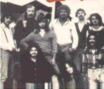 Soluna. Grupo de rock argentino (1976-1977): Alejandro Lerner, Gustavo Santaolalla, Horacio Gianello, Mónica Campins, Oscar "Osqui" Amante, Ricardo Libman